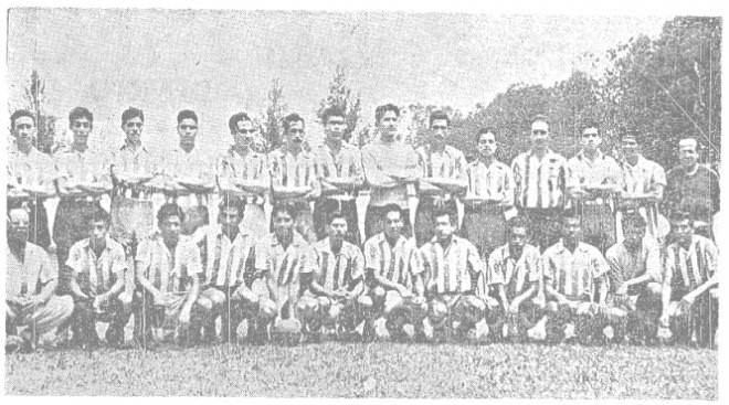 Equipo donde jugo el "Tepa"